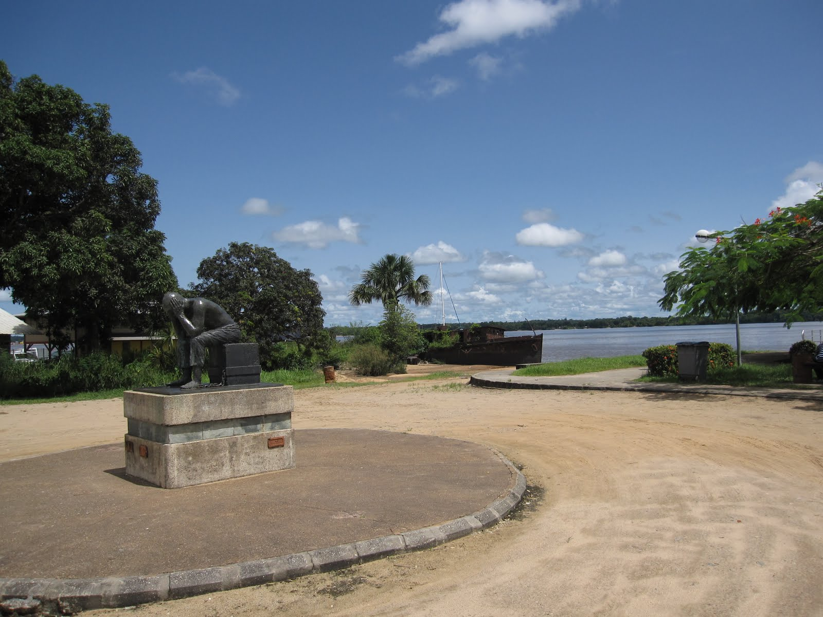 Monument aux bagnards à Saint-Laurent-du-Maroni